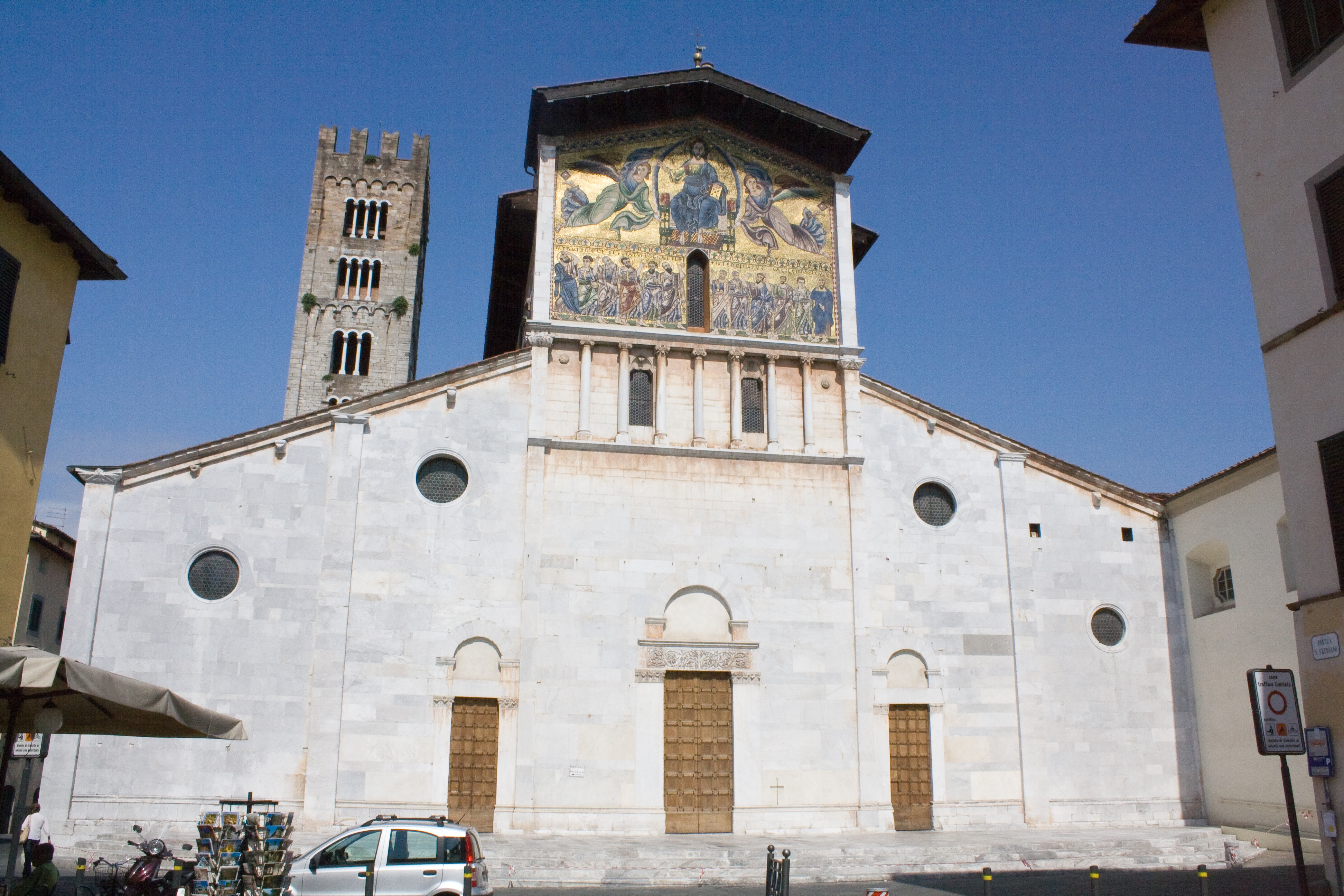 Basilica di San Frediano, Lucca 12th Century